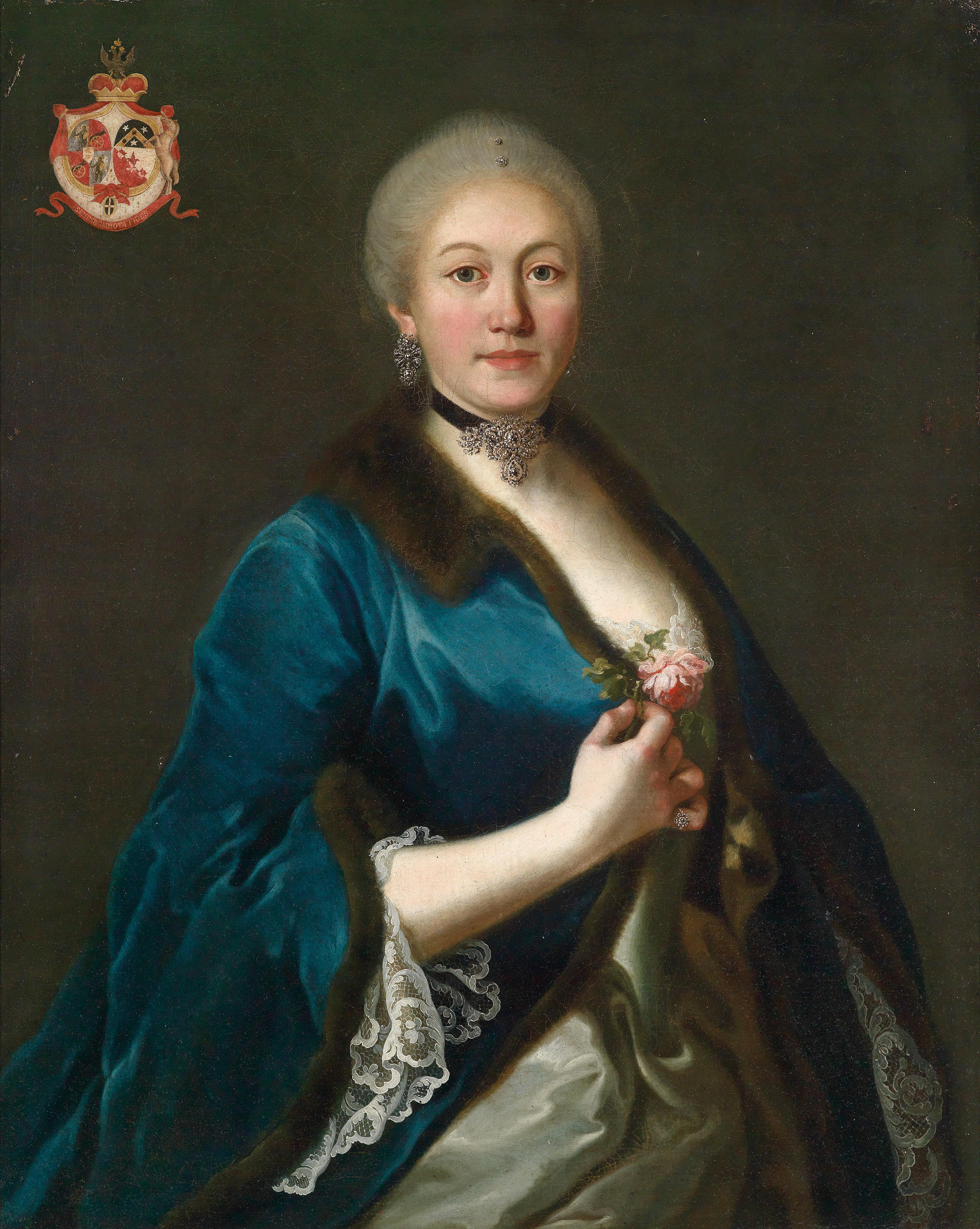 Bildnis der Fürstin Yekaterina Dashkova-Vorontsova (1743–1810), oben links das Allianzwappen Dashkov-Vorontsov, Öl auf Leinwand, 91 x 73,5 cm, französische Schule um 1780